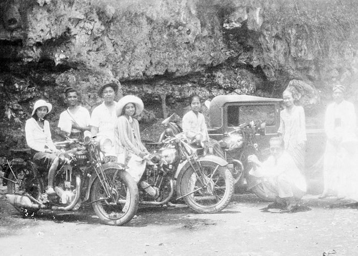 foto. Portret van een groep Indo-Europese mannen en vrouwen met motorfietsen